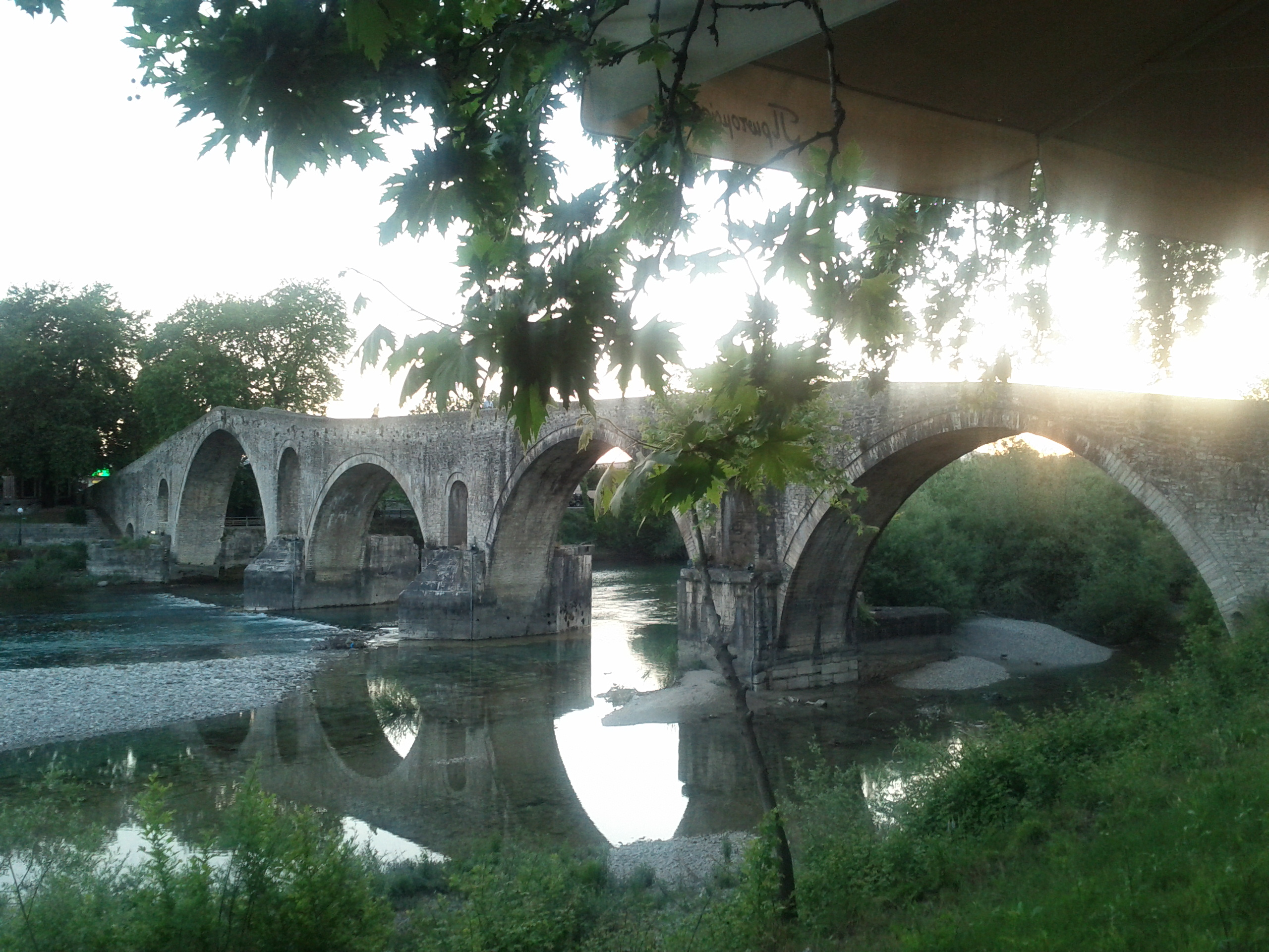 Το γεφύρι της Άρτας, Ήπειρος, Ελλάδα